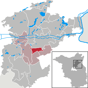 Melchow in Brandenburg (Country) - District Barnim